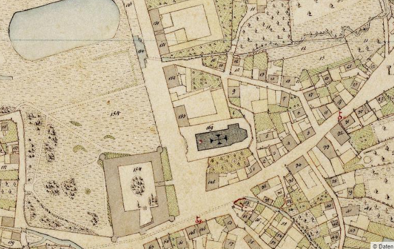 Kartenausschnitt Urkataster Bayern 1833, Ortskern Wiesentheid